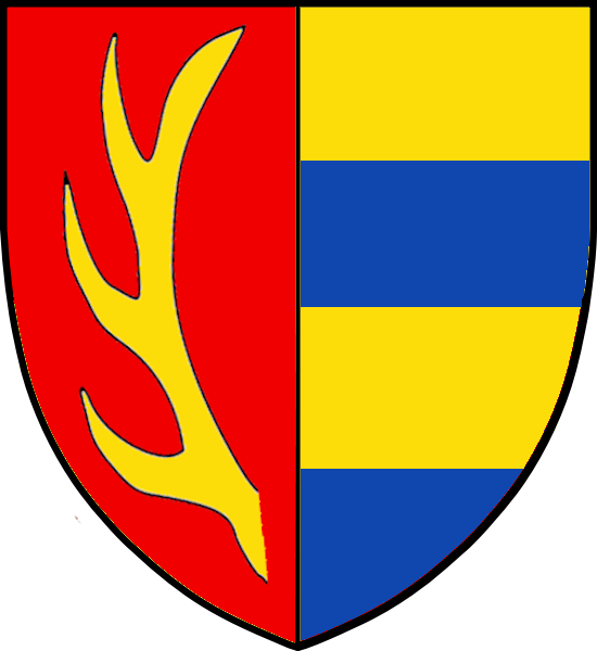 Vapensköld för danska adelsätten Rani